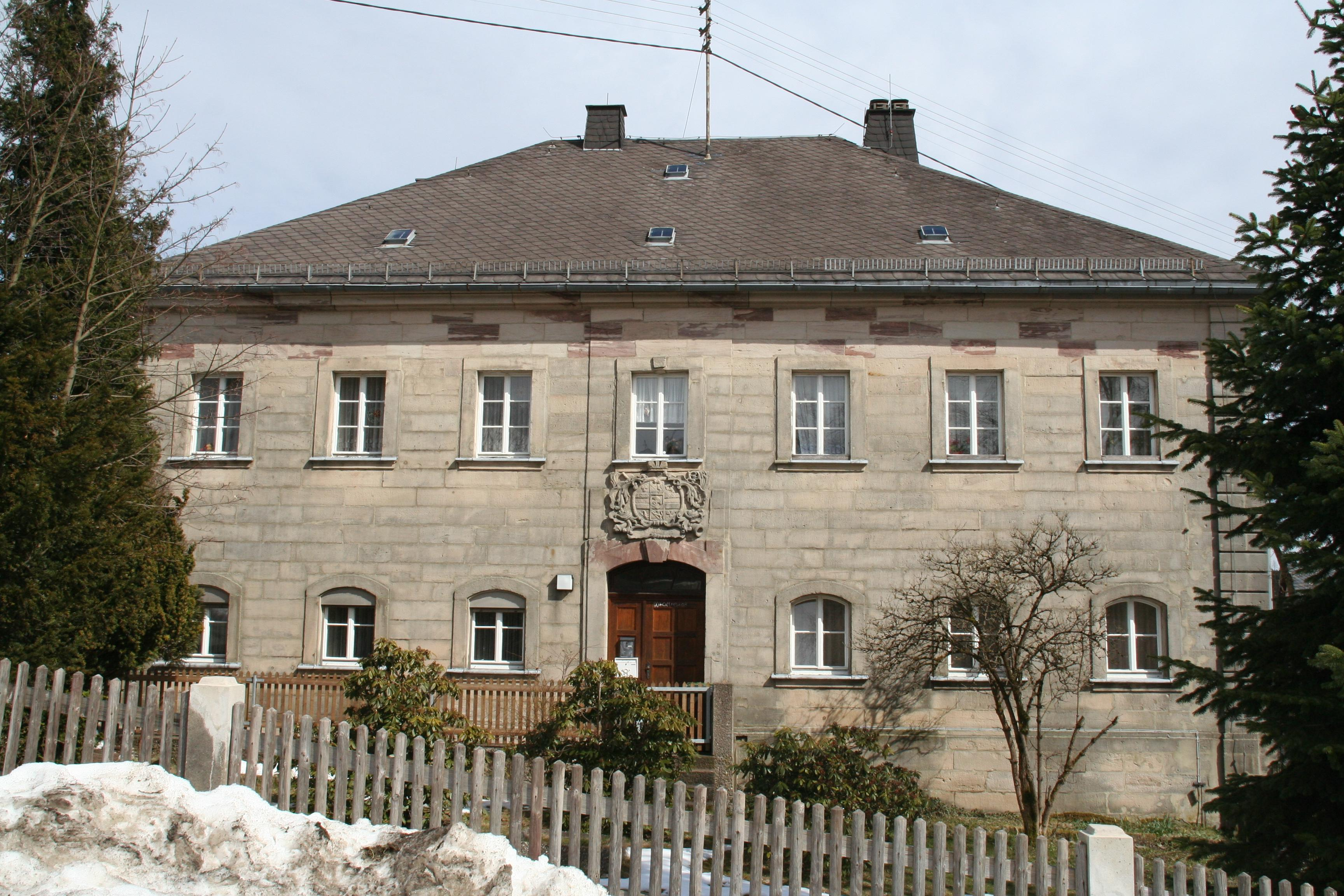 Nordhalben im Landkreis Kronach, Ehem. Amtshaus der Bamberger Fürstbischöfe